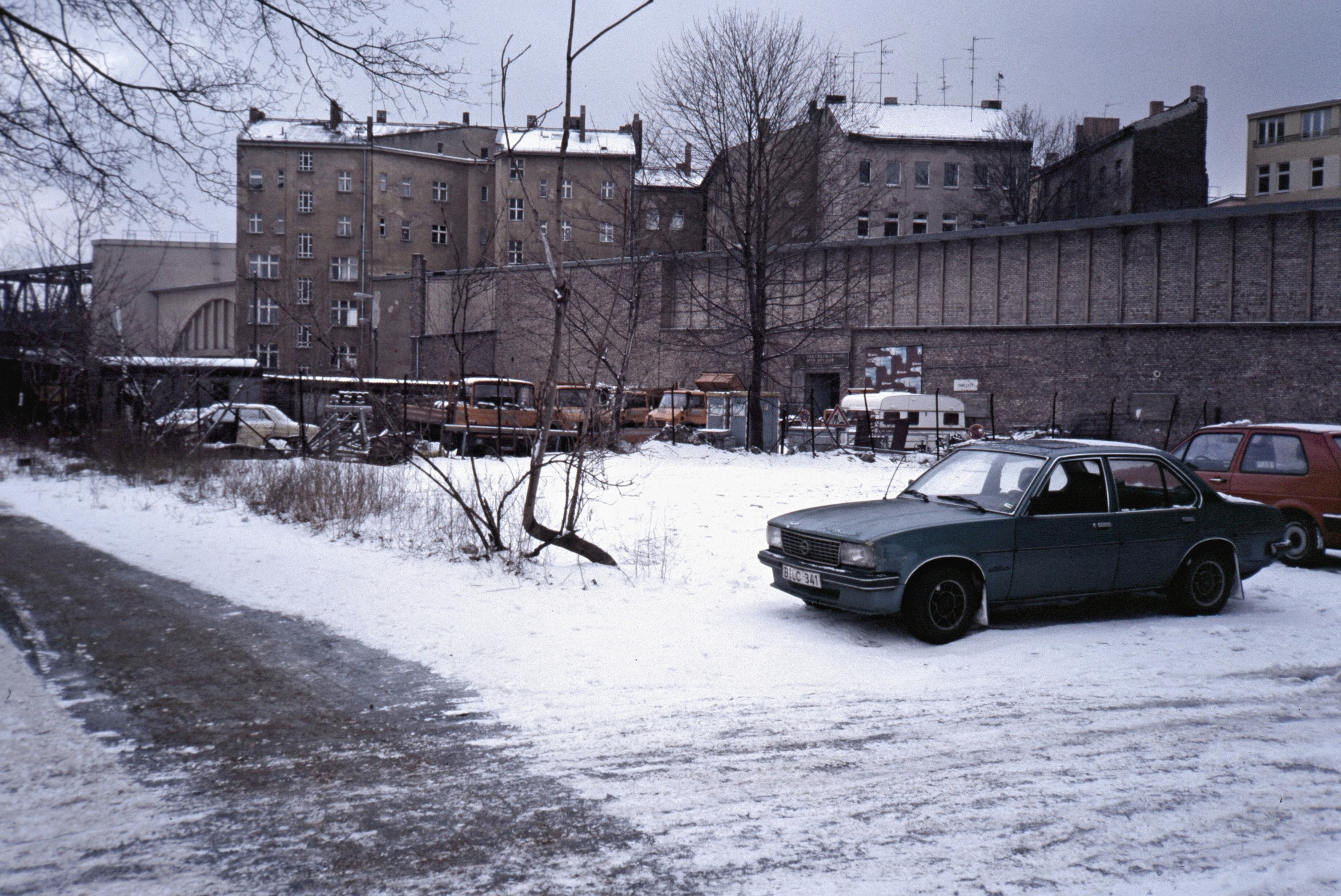 Eingehauste Rampe der U1 an der Pohlstraße in Berlin